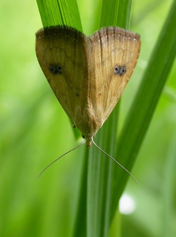 Rivula sericealis, Salles, Gironde, France